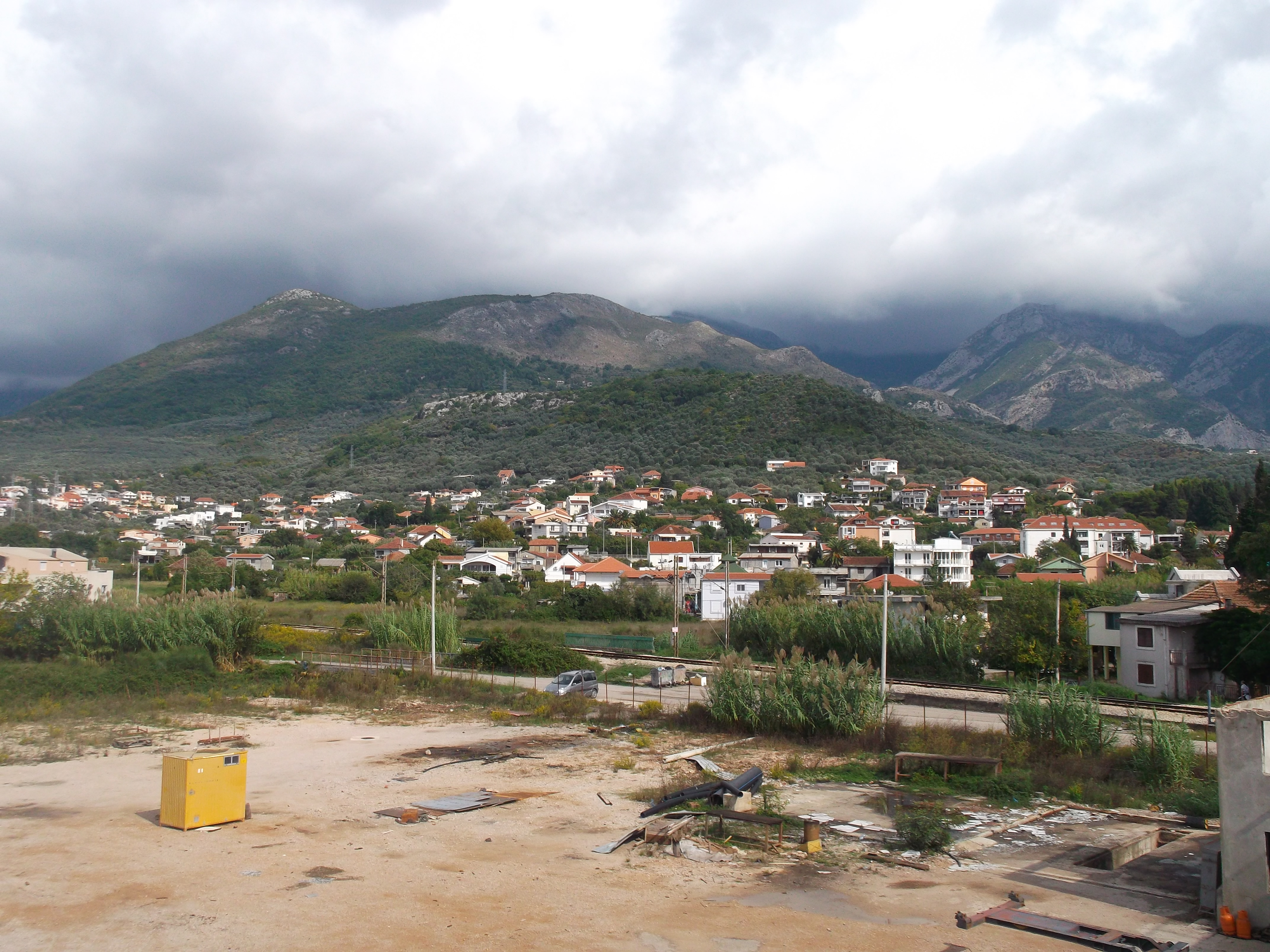 Bjeliši, Montenegro